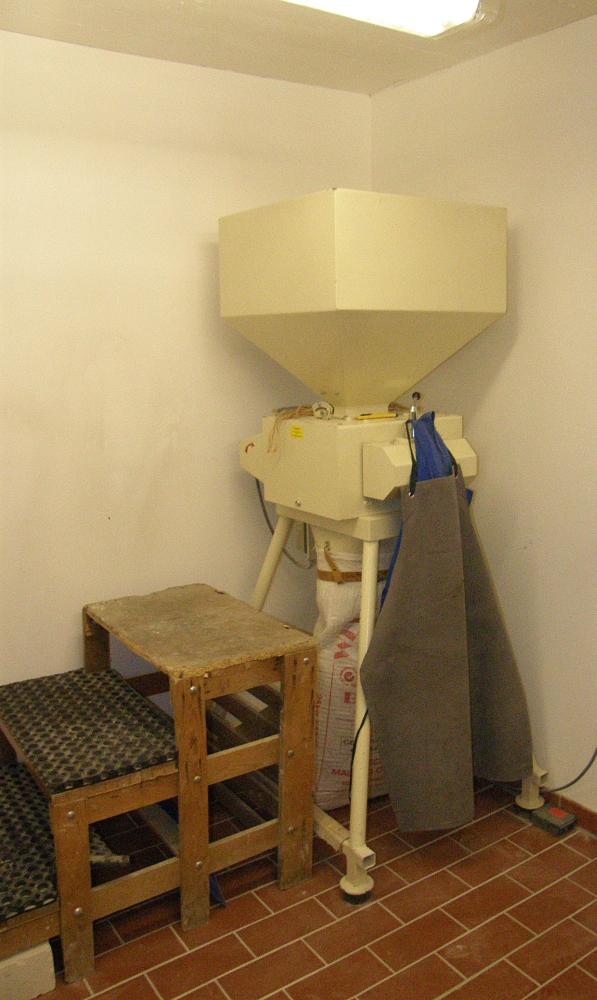 Malzmühle der Stadtbrauerei HBX in Hannover